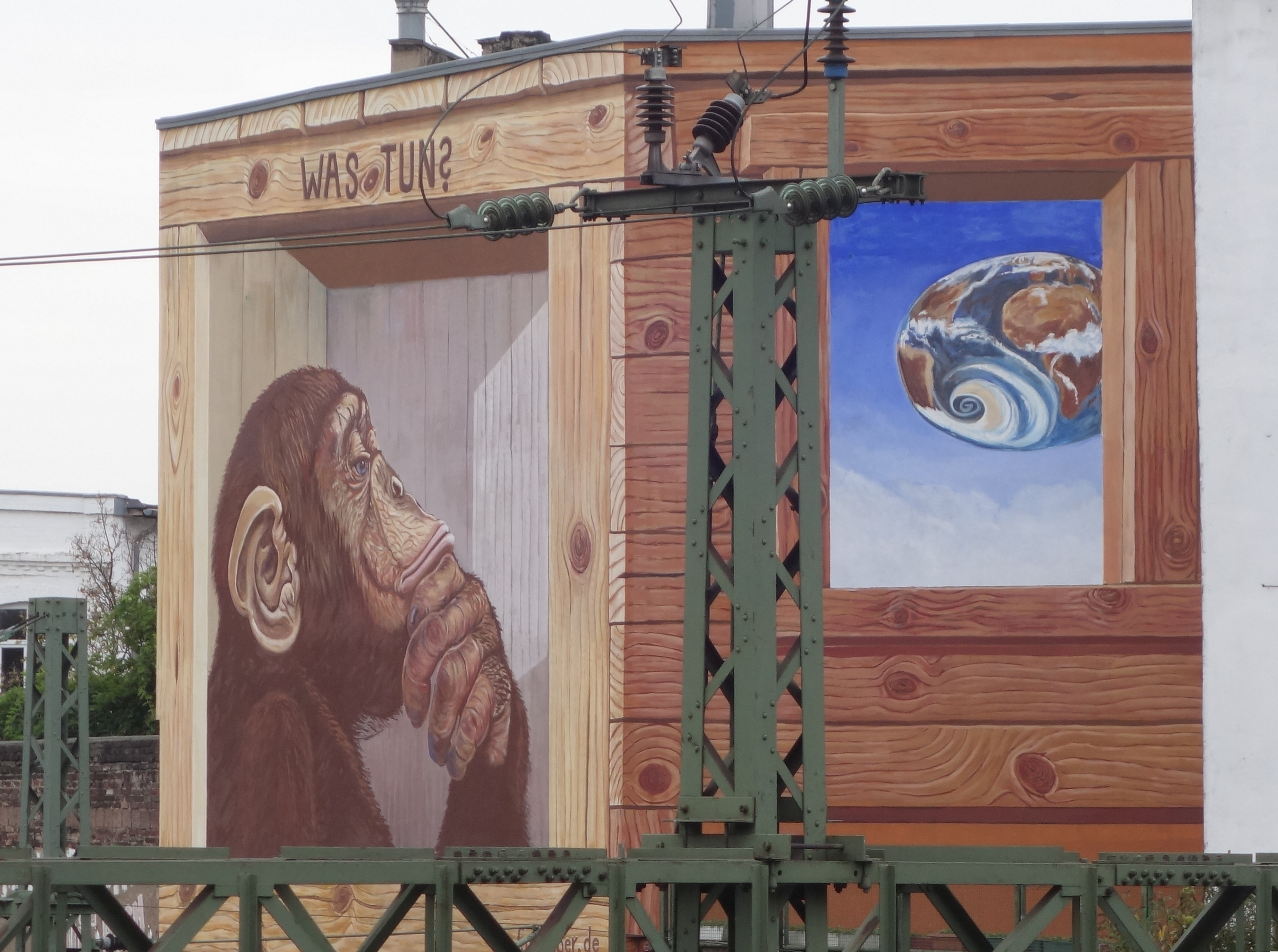 „Was tun?“ Wandmalerei Klaus Klinger, Düsseldorf, Ackerstraße (2018).